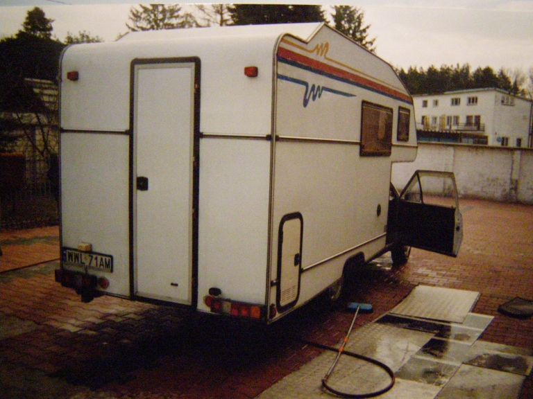 Polonez Truck Kemping, widok z tyłu